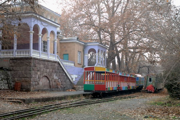 Bahnhof der Kindereisenbahn Erewan